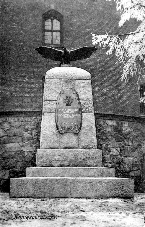 Regimentsdenkmal für das Grenadierregiment Kronprinz in Königsberg von 1905 mit dem Text: Seinen gefallenen Kameraden Das Grenadier-Regiment Kronprinz 1655-1905 Nach dem 1. Weltkrieg wurde eine Platte hinzugefügt: Für Deutschlands Ehre und Sieg gaben ihr Leben im Weltkriege 1914-1918 137 Offiziere und 5293 Unteroffiziere und Mannschaften.